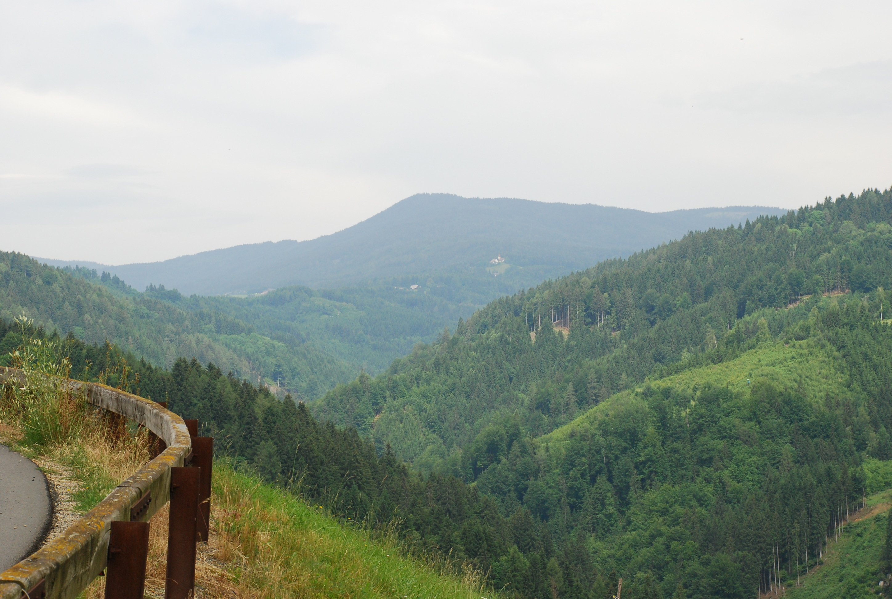 Tal des Wildbaches (Hohe Laßnitz), im Hintergrund St. Oswald und Schwarzkogel, vom Kramermirtl aus (Freiland, Hinterleitenstraße)